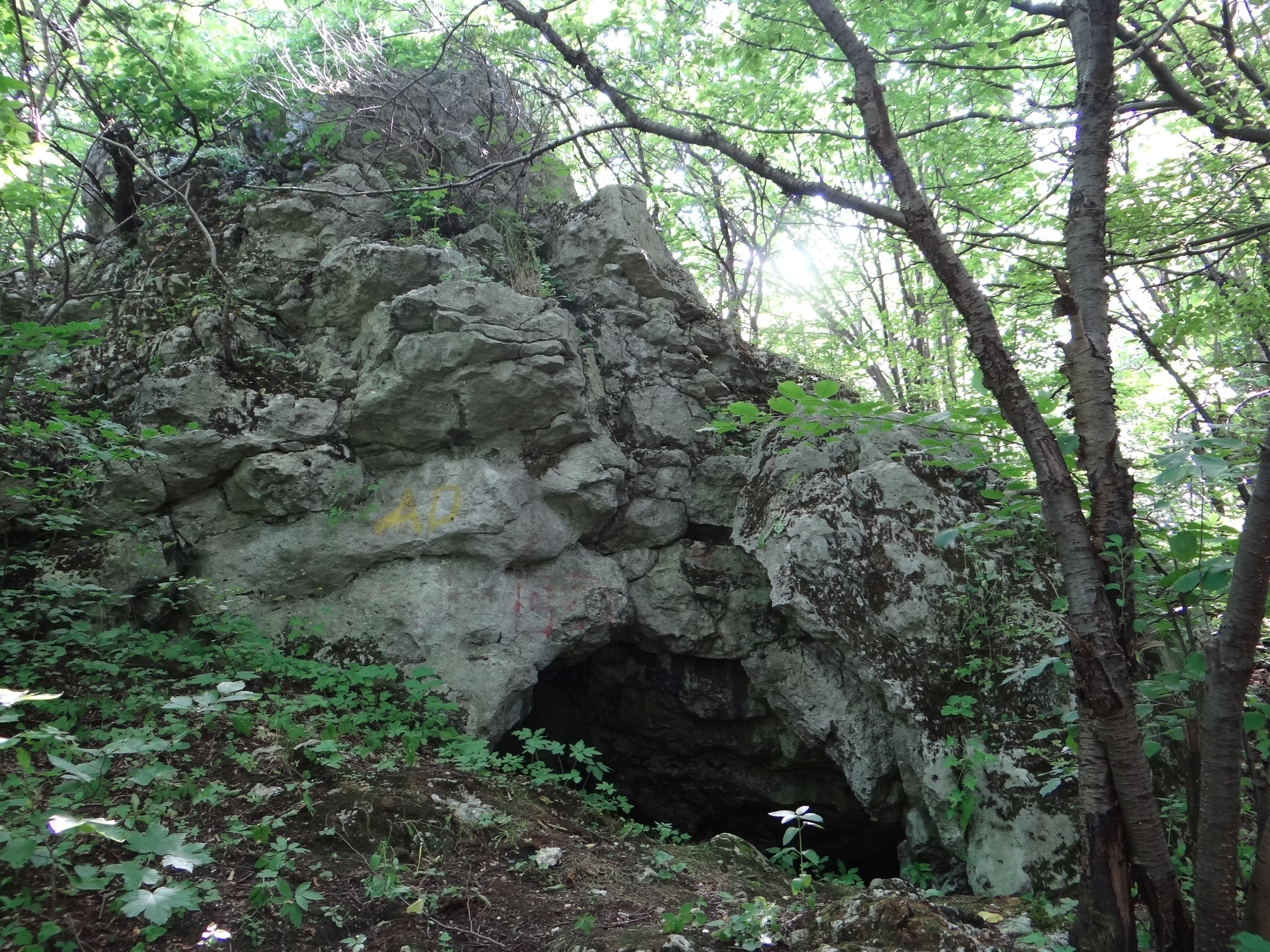 Schronisko w Starym Łomiku w grupie Pomorzańskich Skał